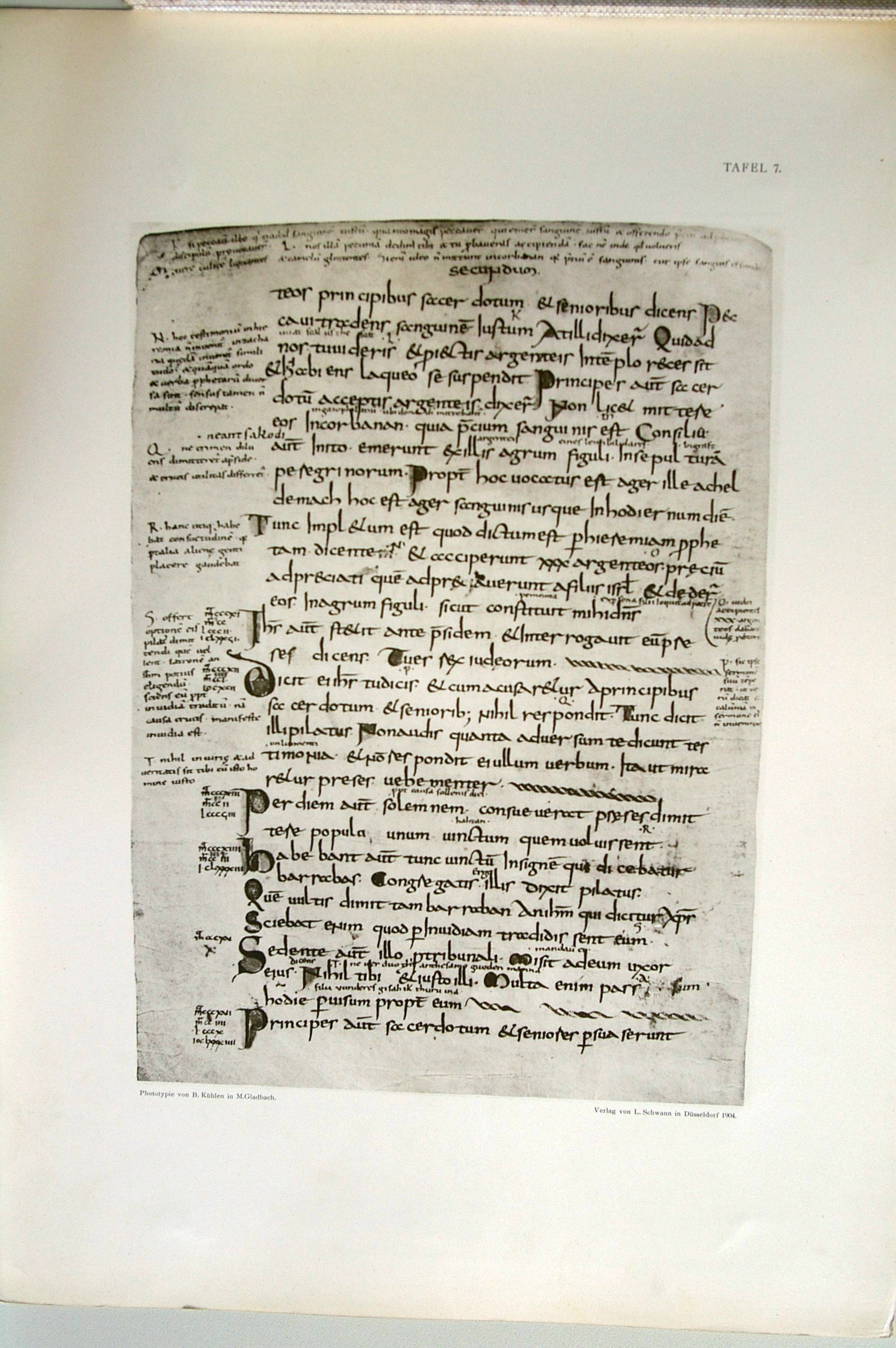 Tafel 8 von Georg Humanns „Die Kunstwerke der Münsterkirche zu Essen“: Zeichnungen und Schriftproben einer Evangelienhandschrift (8.-9. Jahrh.)